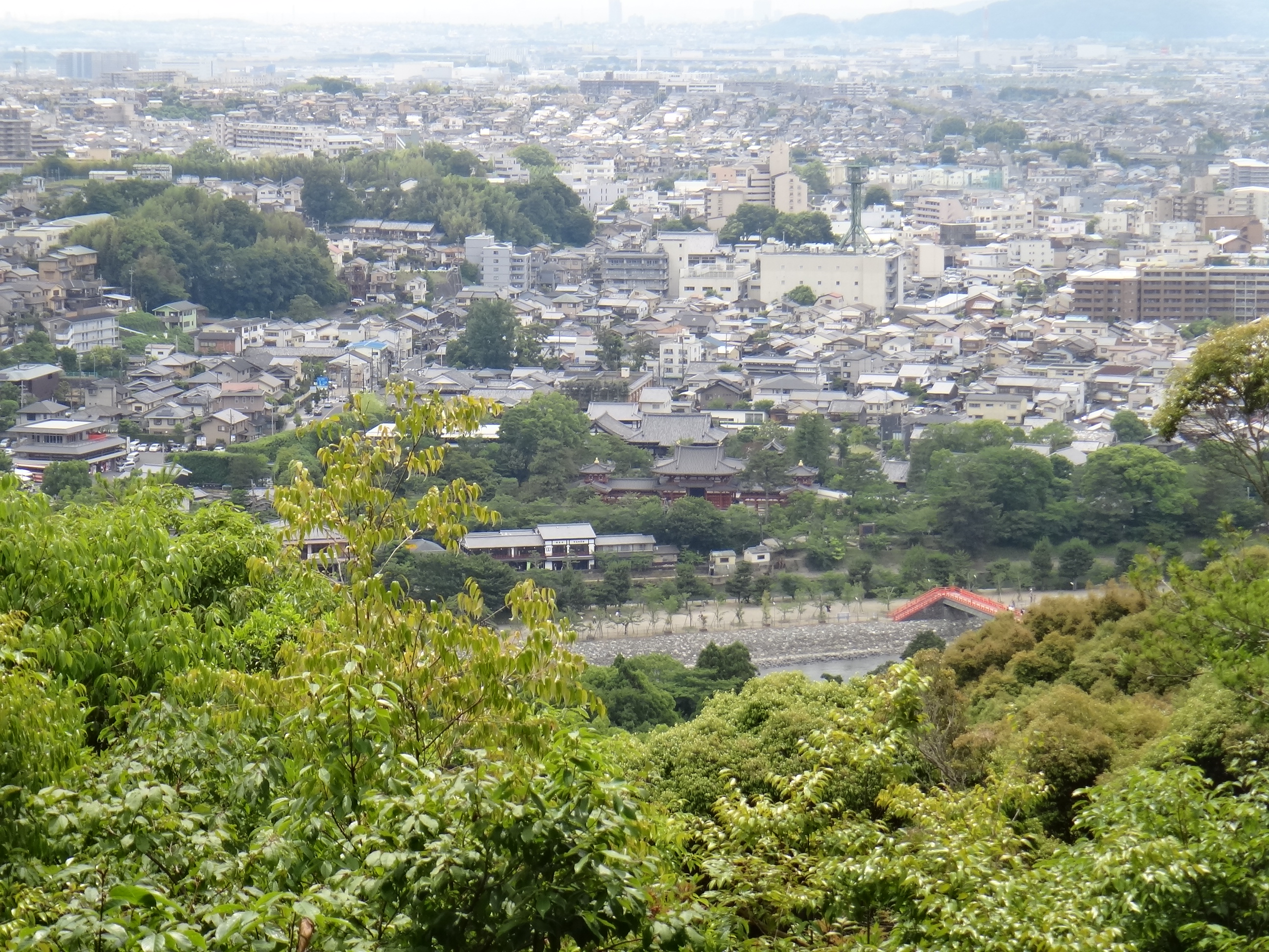 宇治市朝日山頂